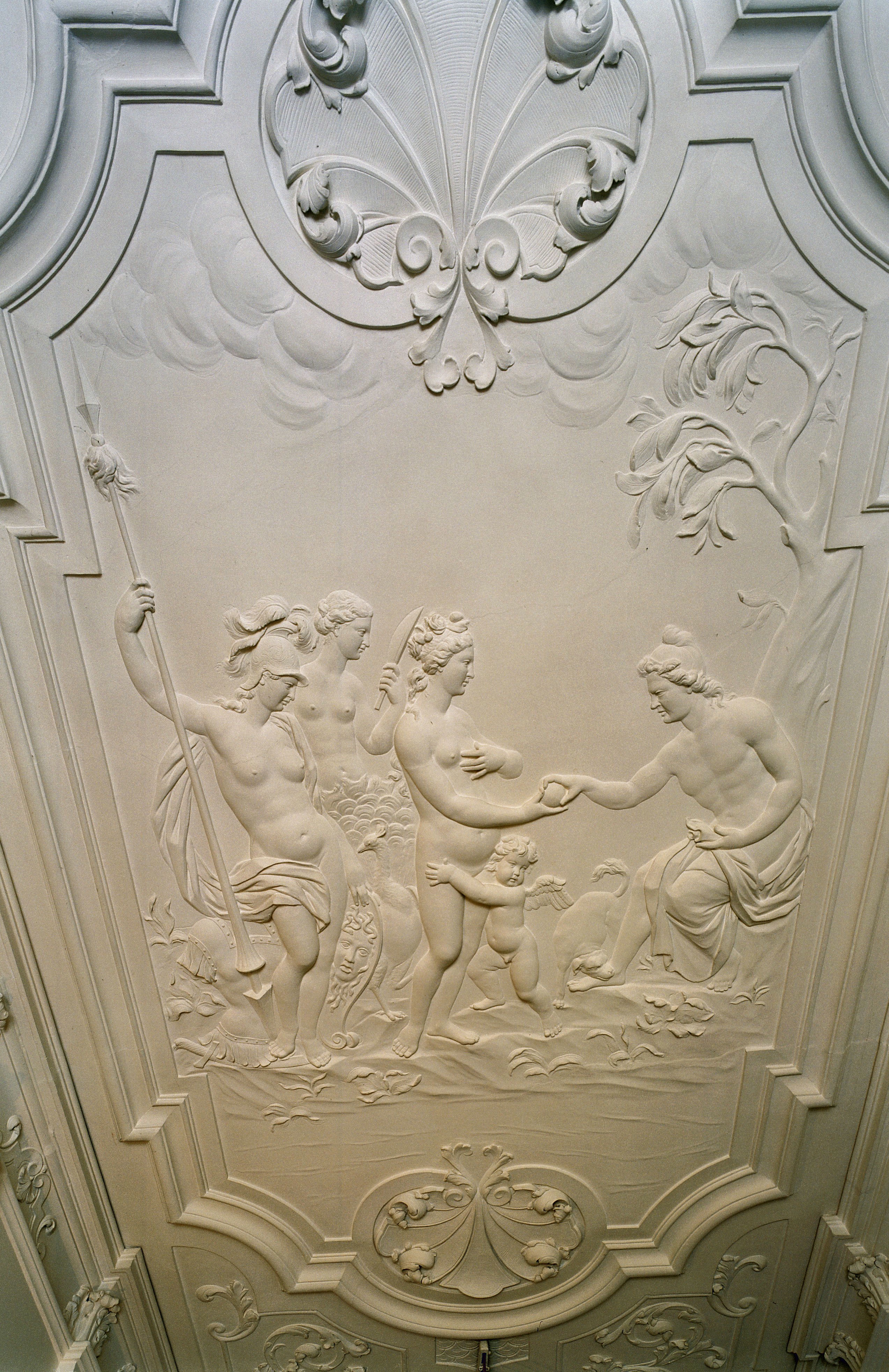 FOREESTENHUIS: Interieur hal, overzicht stucplafond